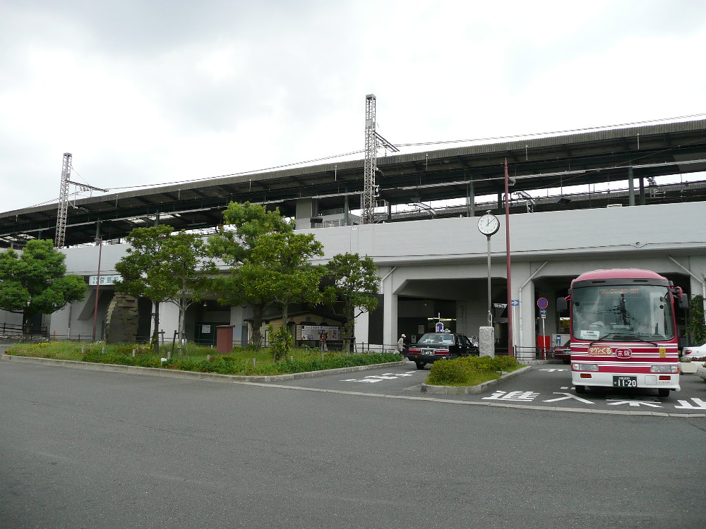 萱島駅